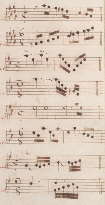 Table du volume VI des manuscrits de Venise (incipit des sonates 23 à 30, K. 318 à 325).